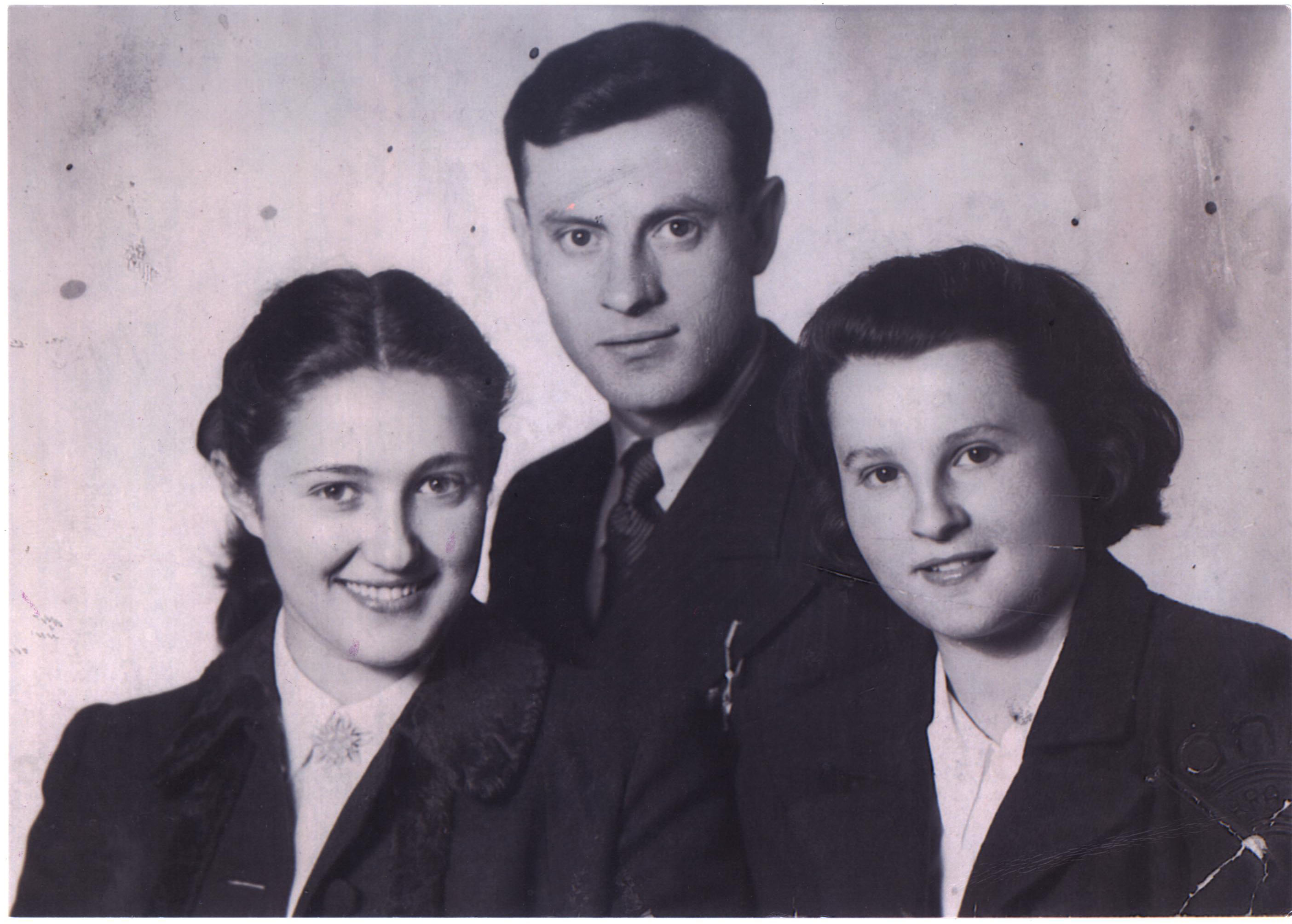 רבקה קופר ודולק ליבסקינד